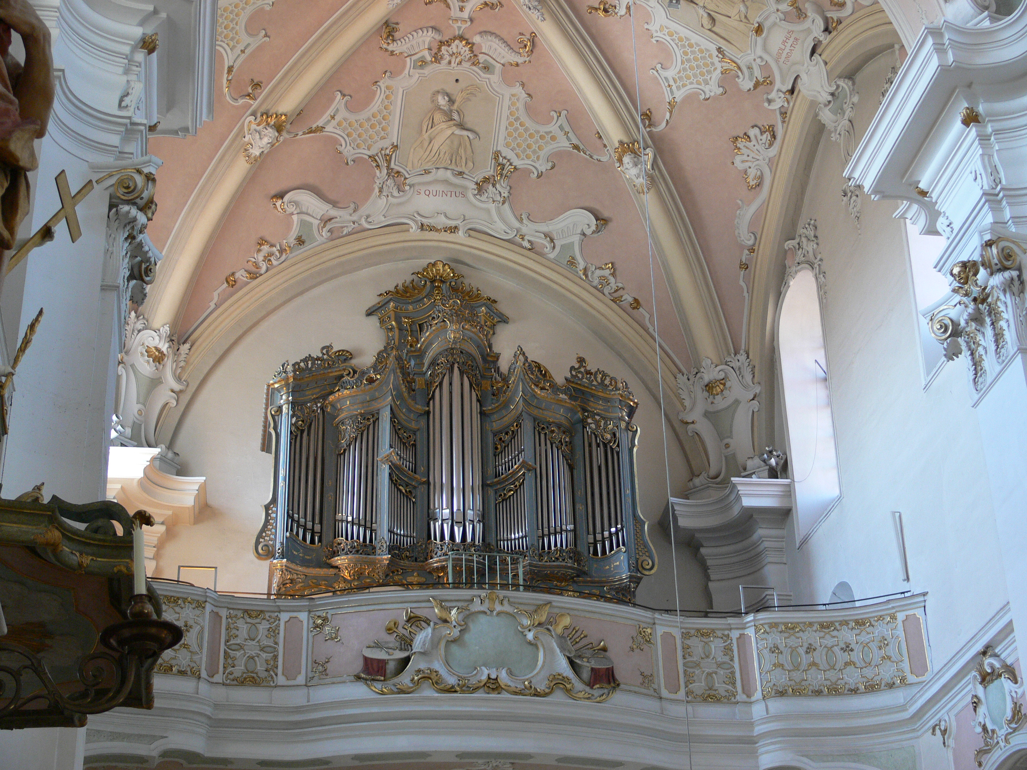 Stiftsbasilika St. Vitus, Ellwangen (Jagst) Orgel (1964 von Werner Walcker-Mayer, 1994 restauriert und erweitert von Eduard Wiedenmann) im Gehäuse von Anton Ehrlich (1776)